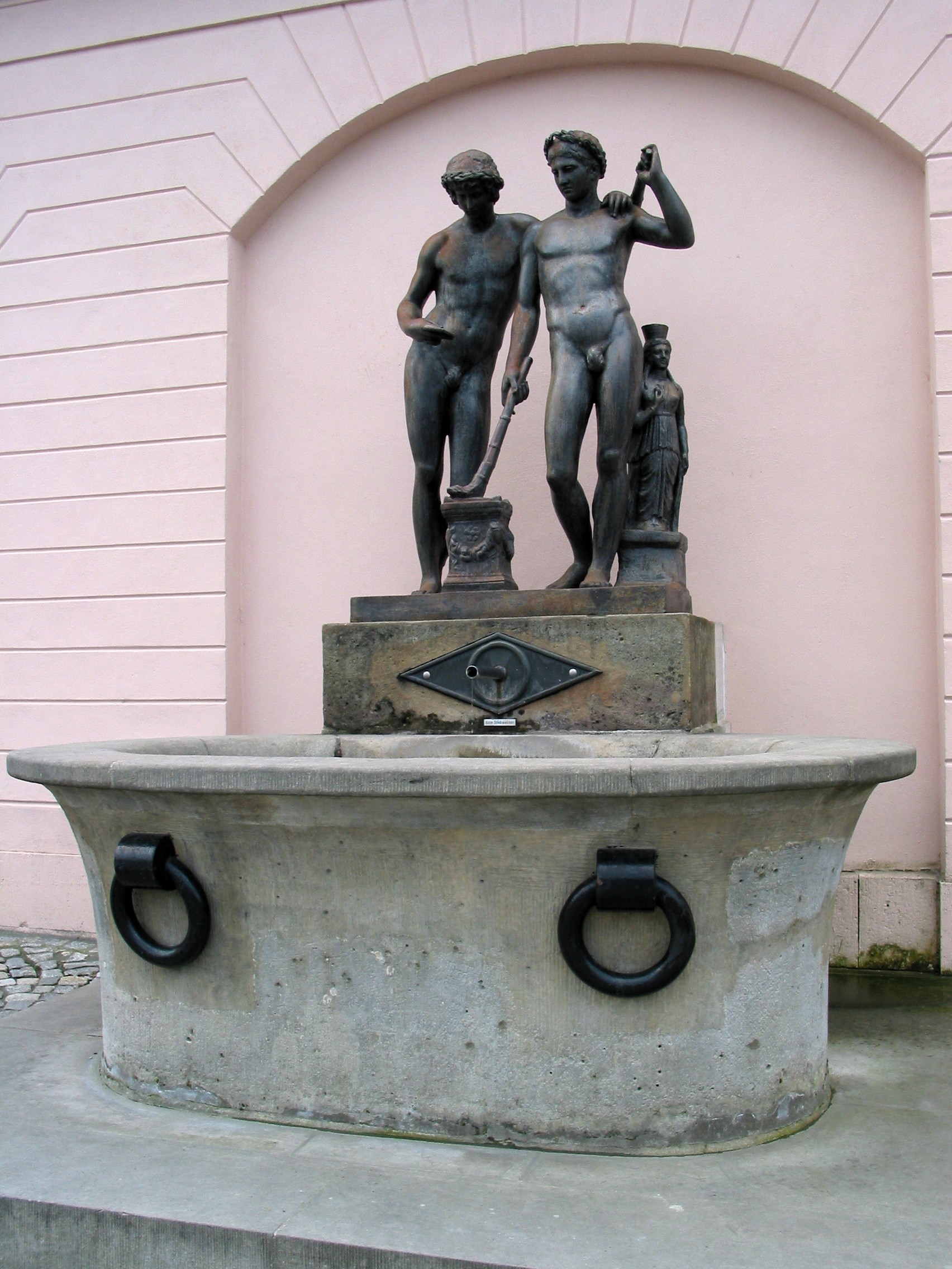 Der Ildefonso-Brunnen an der Ostseite des Roten Schlosses am Platz der Demokratie in Weimar/Thüringen.